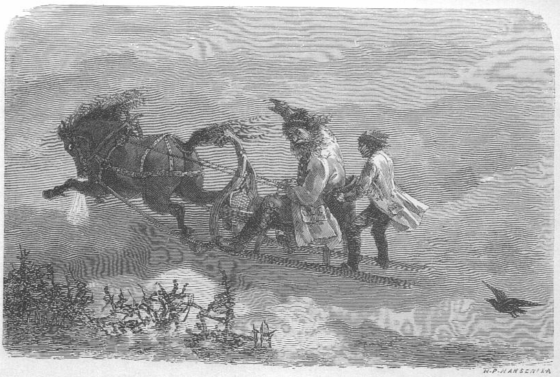 Illustration for the folktale Jutulen og Johannes Blessom in the book Norske Folke og Huldre-Eventyr i udvalg ved P. Chr. Asbjørnsen. Andet oplag. 1896